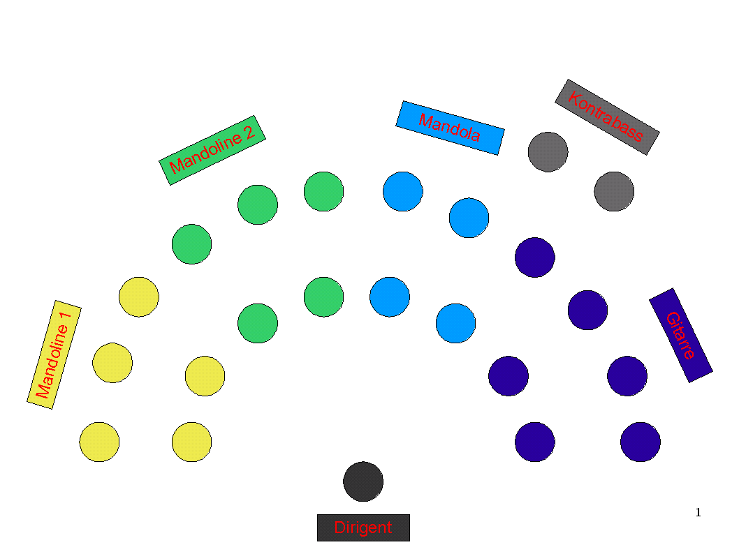 In der Grafik wird die übliche Sitzordnung eines Zupforchesters auf der Bühne dargestellt. Die Anzahl der Spieler pro Stimme ist dabei schematisch angenommen und variiert von Orchester zu Orchester